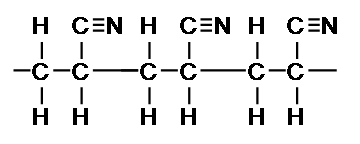 A poliakrilnitril láncmolekula szerkezeti képlete